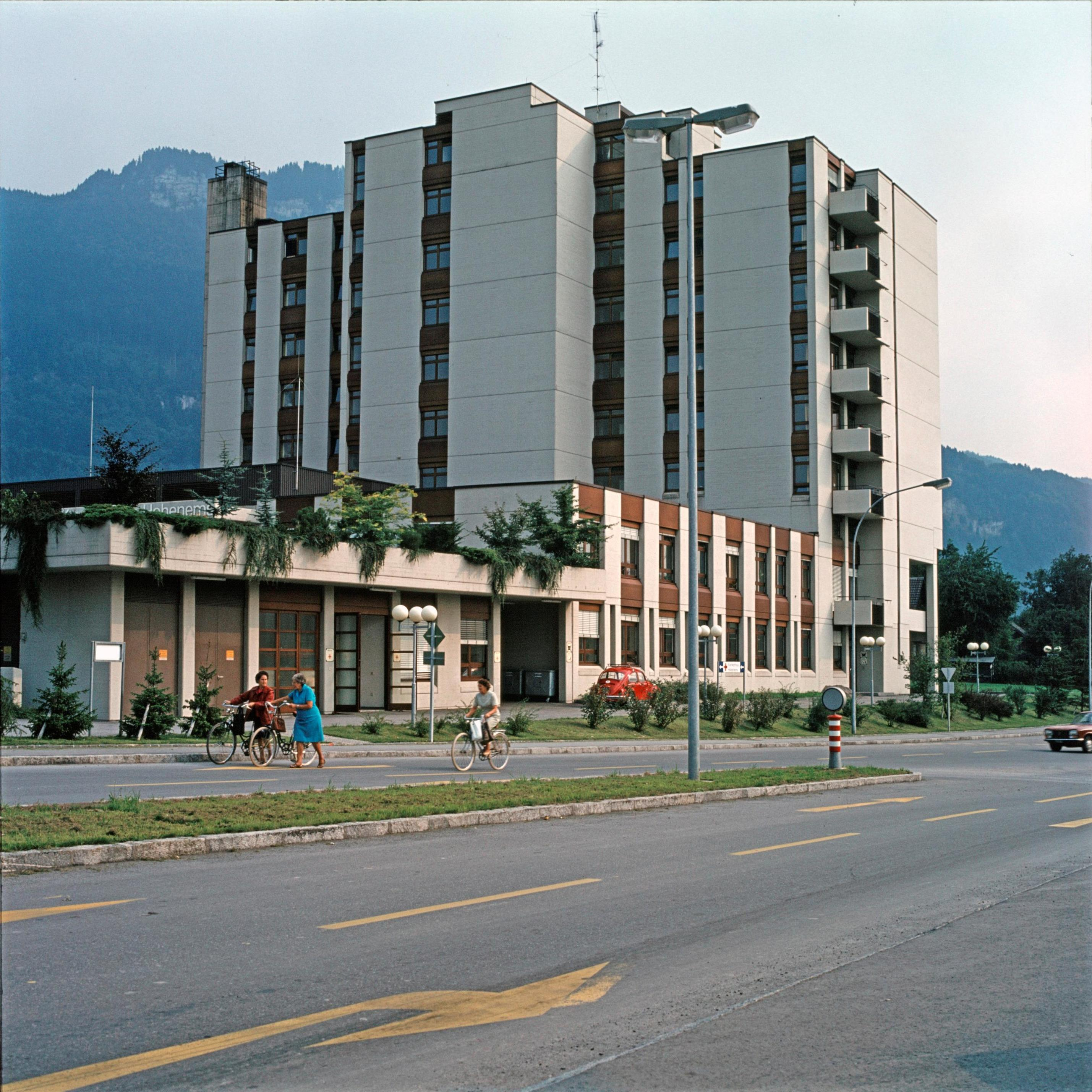 Das Landeskrankenhaus Hohenems kurz nach seiner Fertigstellung, hier im Jahr 1976 in einer Farbaufnahme.